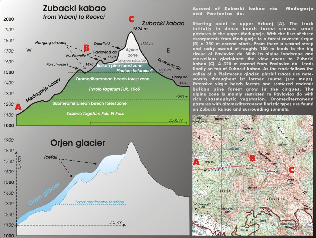 Ascend of Orjen via Medugorje valley